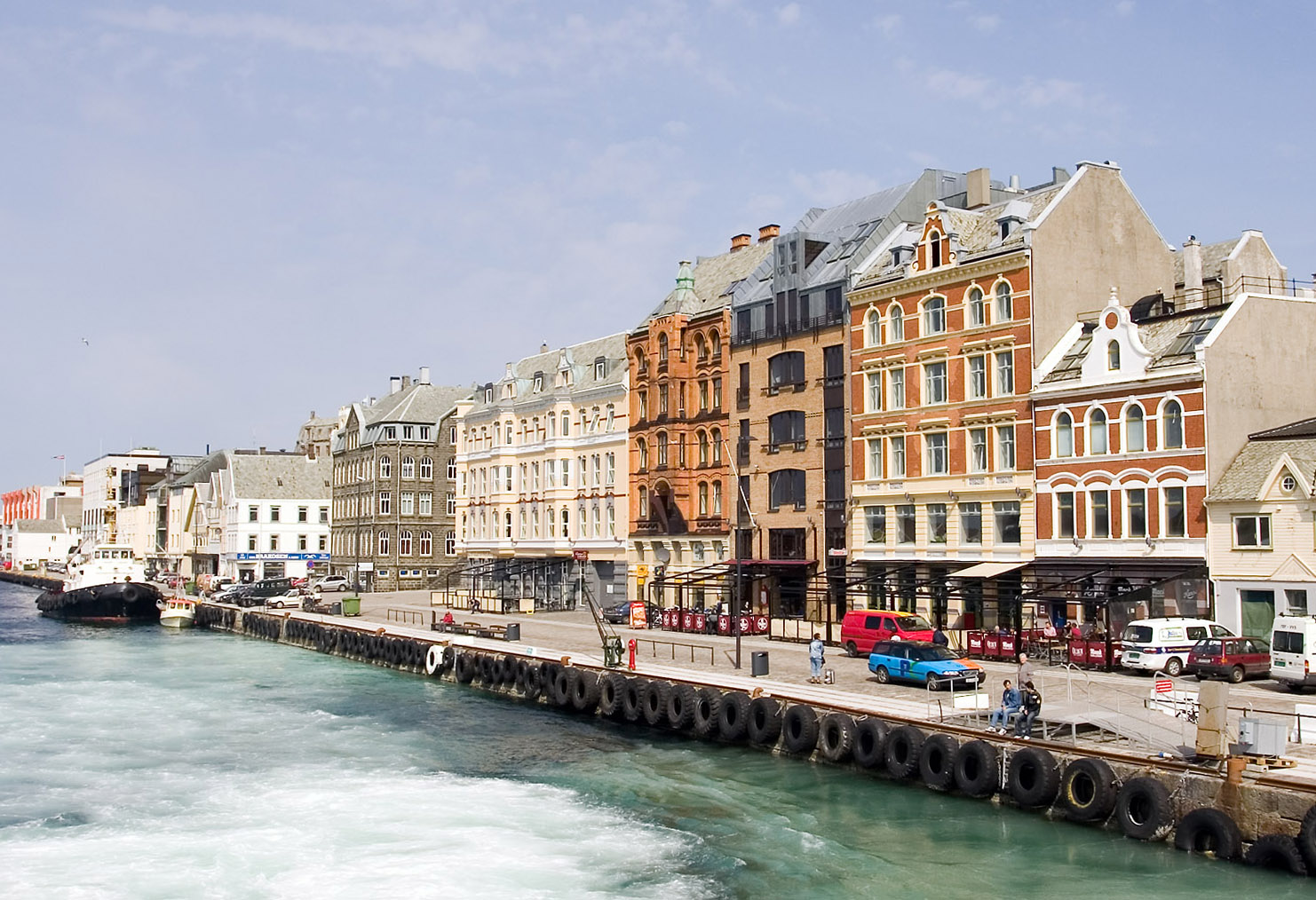 Haugesund, Norway